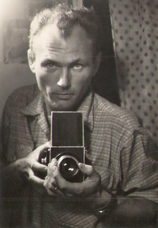 Miroslav Peterka fotograf